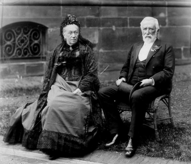 Eugen Boch und Oktavie Villeroy zur Goldenen Hochzeit 1892 andere Versionen: ...